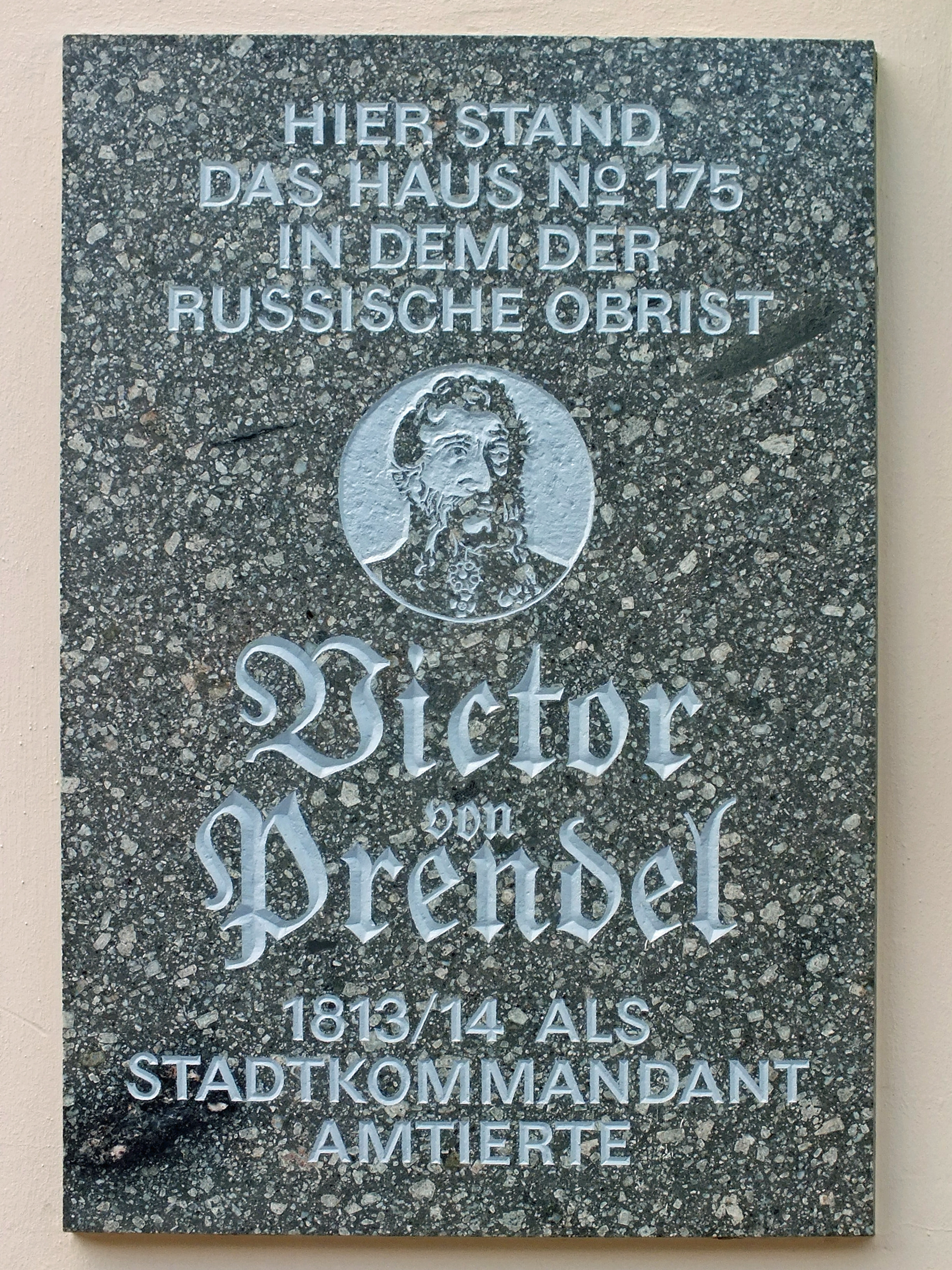 Tafel am ehemaligen Amtshaus des Leipziger Stadtkommandanten Victor von Prendel